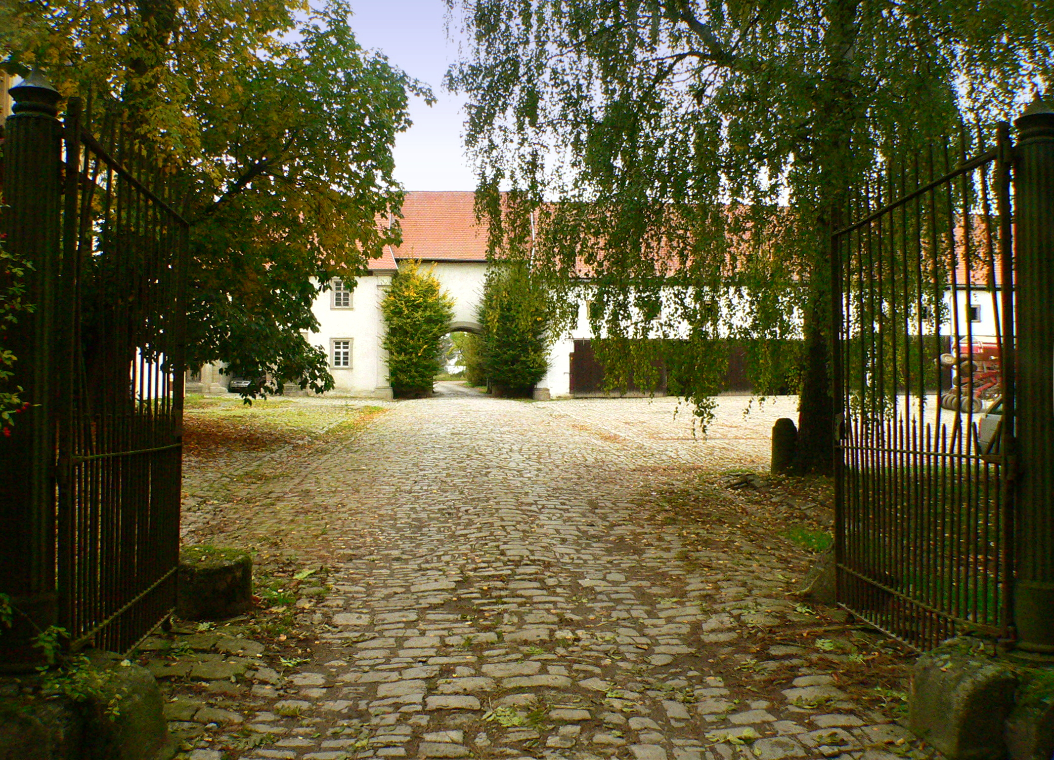 Kloster Obertheres, Klosterhof (ehem. Standort der Abteikirche)